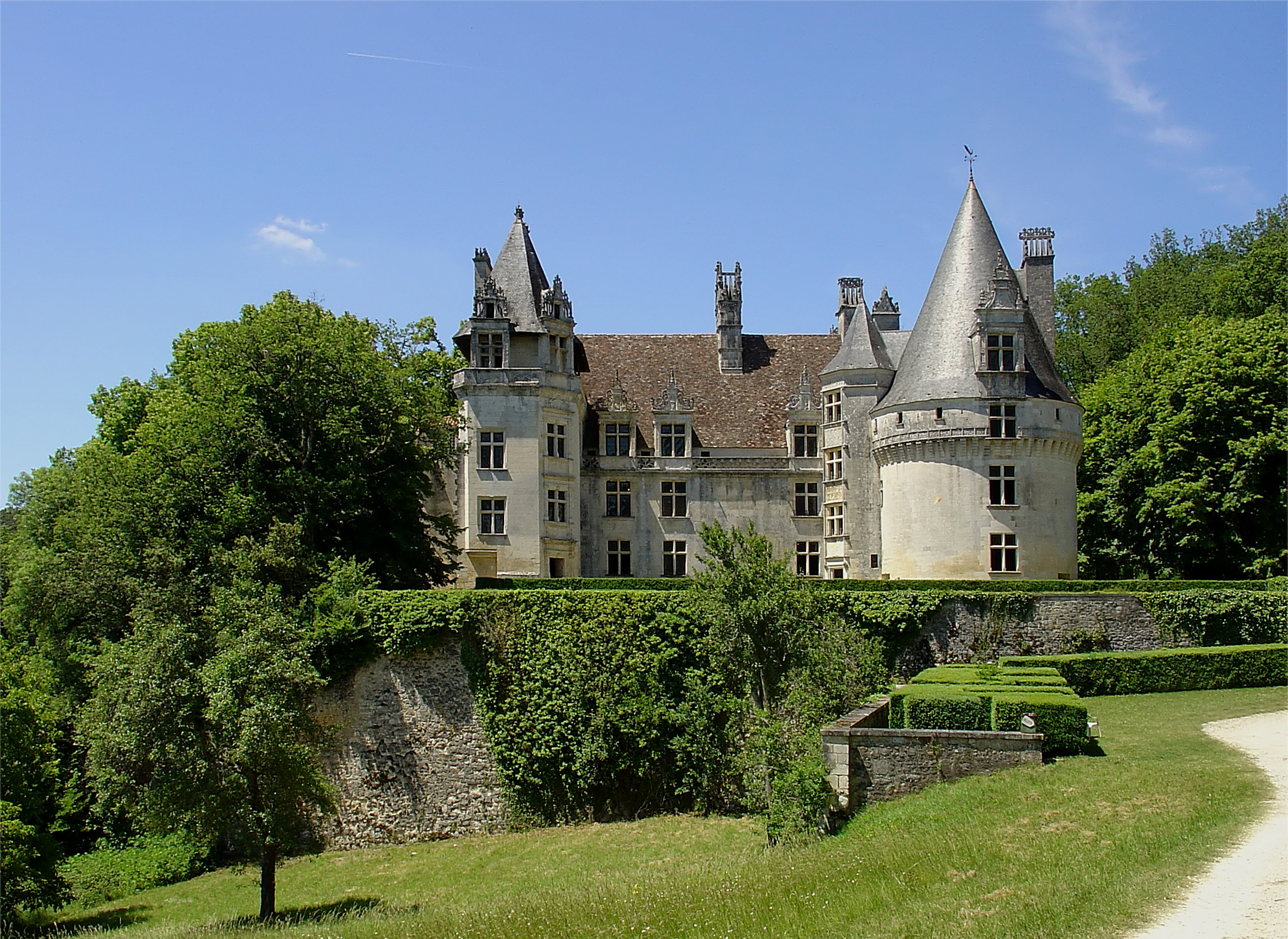 Schloss Puyguilhem in der Nähe der Ortschaft Villars im Département Dordogne des französischen Périgord.